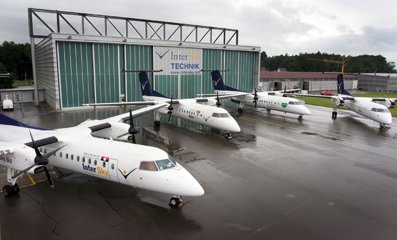 InterSky Flotte vor dem InterSky Technik Hangar in Friedrichshafen